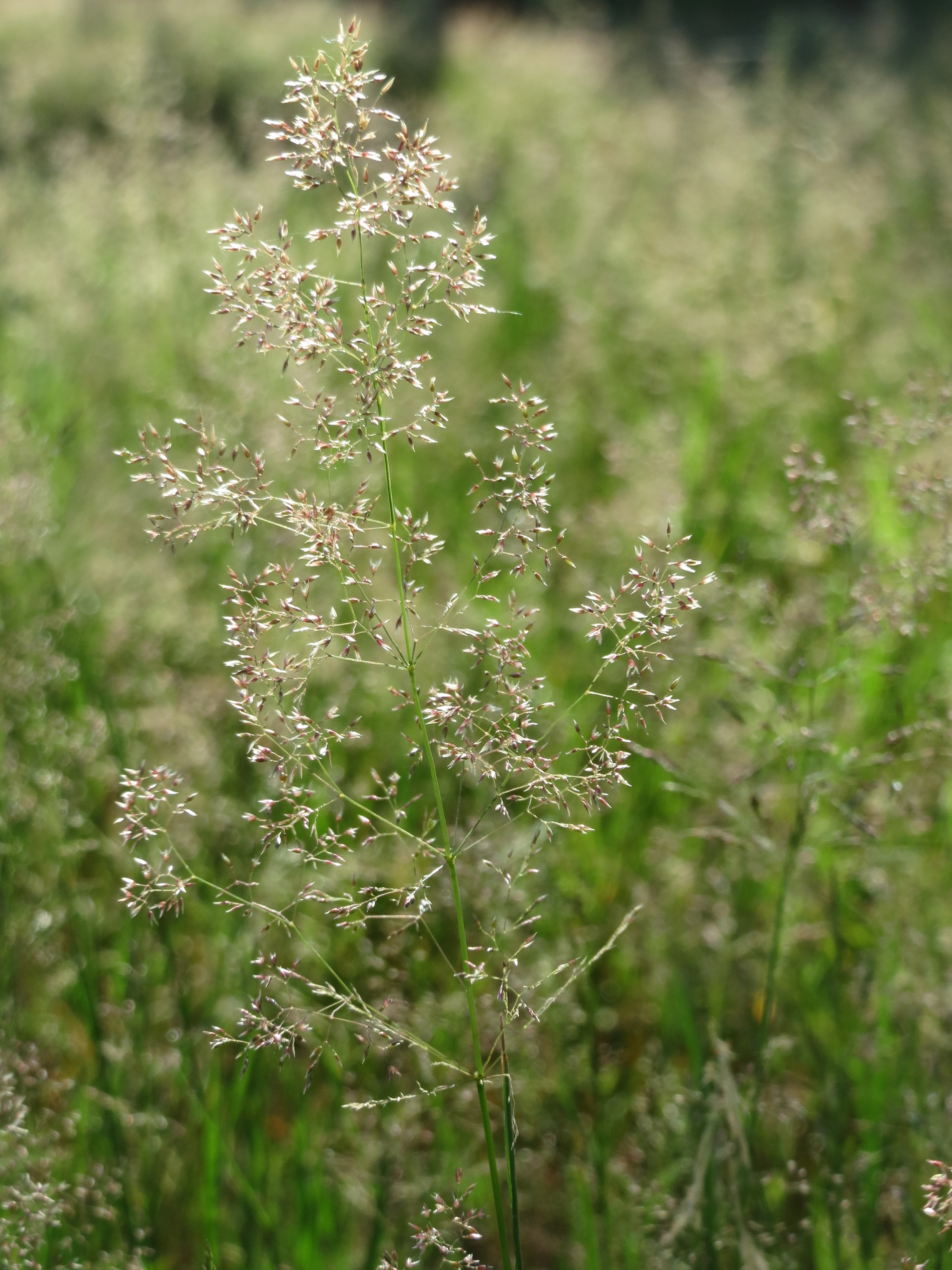 Rotes Straußgras (Agrostis capillaris) im Schwetzinger Hardt